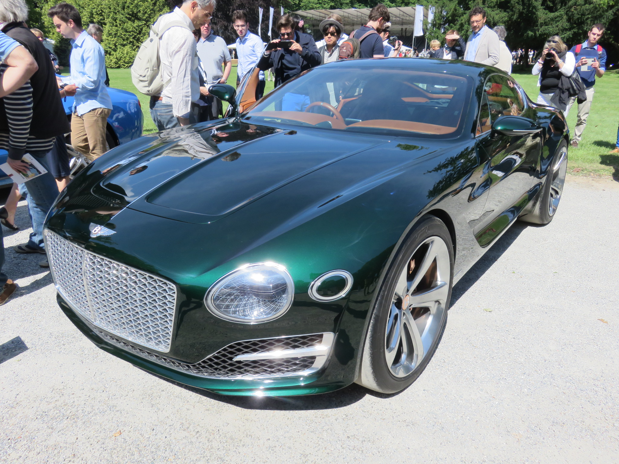 Bentley EXP 10 Speed 6, concours d'élégance Villa d'Este 2015